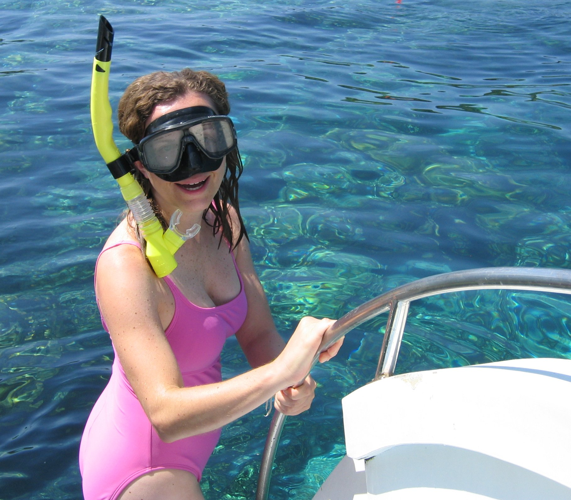 Snorkeler ready for dive.snorkel carrie